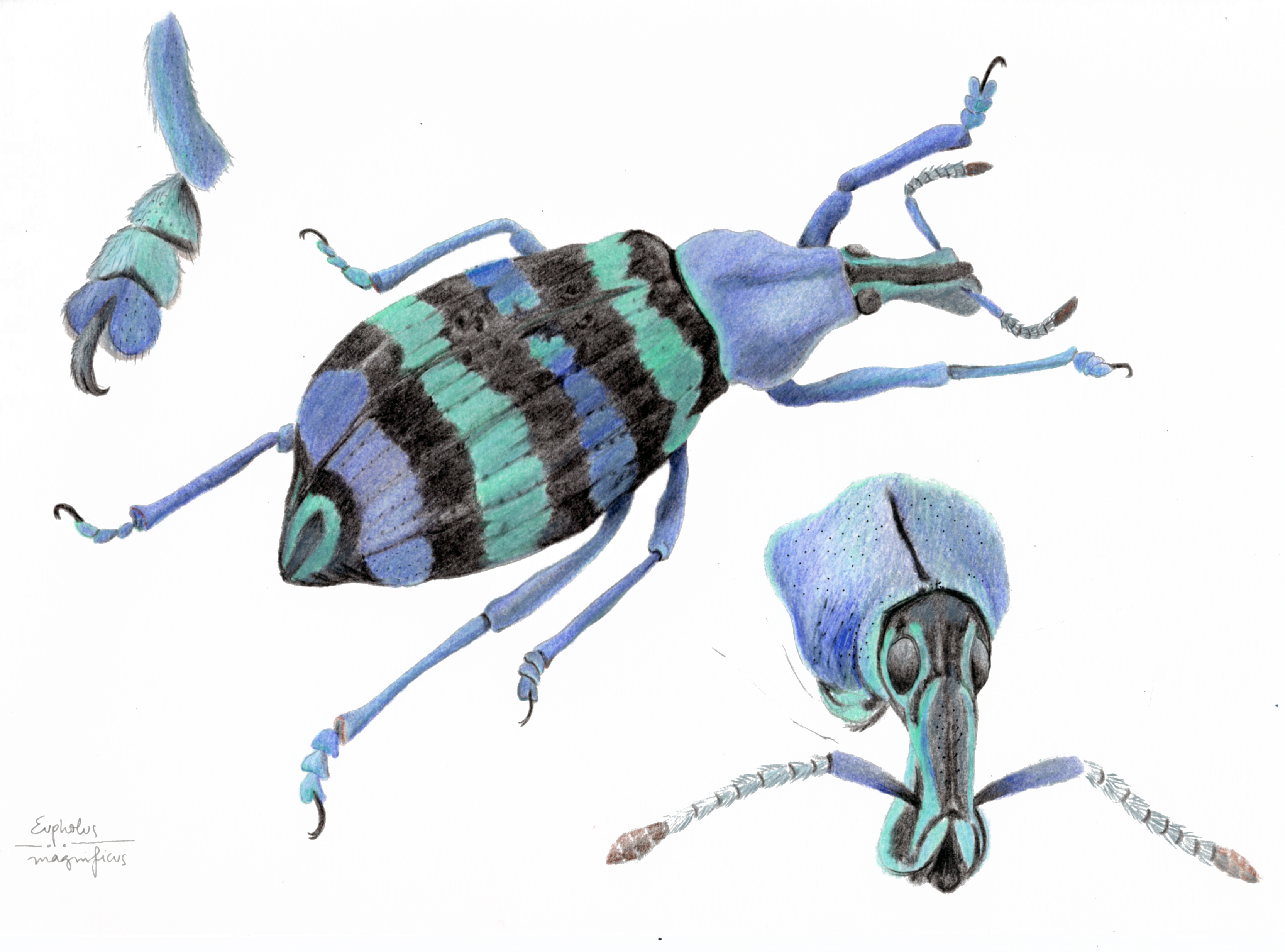 Ilustración de Eupholus magníficus con detalle de mandíbula y patas